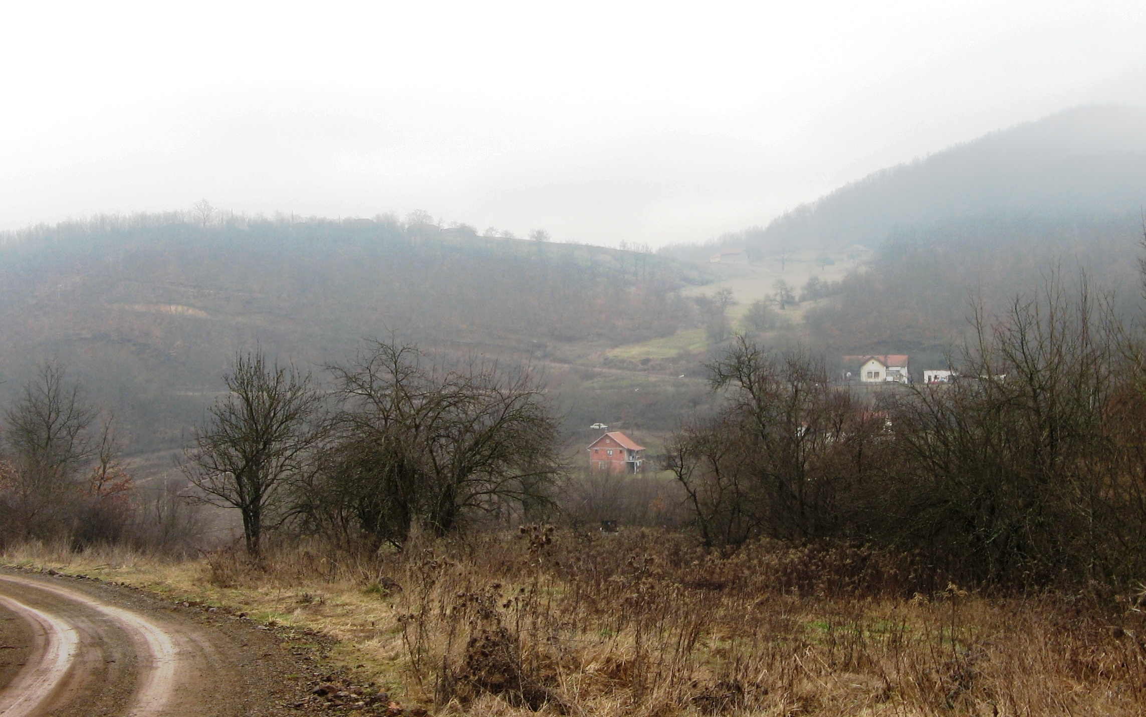 Degrmen, Kuršumlija